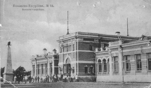 Вокзальная площадь станции Уссурийск до 1917 года